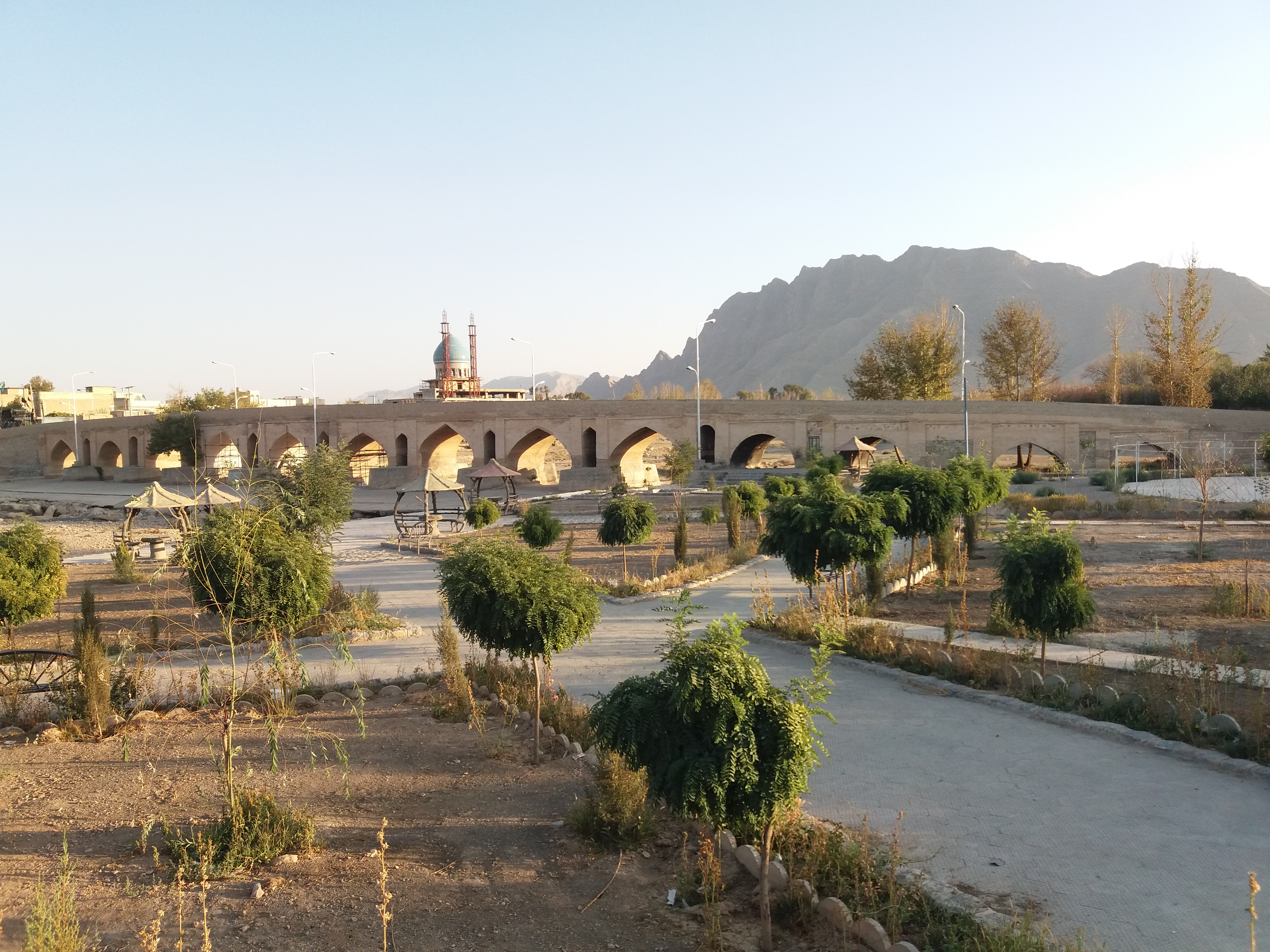 پل بابا محمود قدمت این پل با توجه به سابقه نزدیک به هشتصد ساله خود حقیقتا قابل تعمق است این پل توسط حاکم محلی که دست نشانده ایلخان مغول بود بنام اولجاتیو و نامش بابا محمود پدر محمد اشترگانی است پی ریزی و بنا شده است یکی از ویژگی های این بنا داشتن گرده ای ملایم در حرکت معماری پل است که تقسیم فشار آب را در دو سوی پل تنظیم می نماید. این پل بارها توسط حاکم زمان تعمیر و بازسازی شده است طول پل حدود ۱۵۲ متر، عرض از ۵ الی ۸ متر متغیر است و ارتفاع آن از سطح بستر رودخانه ۷۲۰ سانتی متر می باشد تاسیس آن به سال ۷۰۲ هجری و بنا به روایتی ۷۱۲ هجری بازمیگردد. این پل توسط حاکم محلی که دست نشانده ایلخان مغول بود بنام اولجاتیو و نامش بابا محمود پدر محمد اشترگانی است پی ریزی و بنا شده است. یکی از ویژگی های این بنا داشتن گرده ای ملایم در حرکت معماری پل است که تقسیم فشار آب را در دو سوی پل تنظیم می نماید. این پل بارها توسط حاکم زمان تعمیر و بازسازی شده است طول پل حدود ۱۵۲ متر، عرض از ۵ الی ۸ متر متغیر است و ارتفاع آن از سطح بستر رودخانه ۷۲۰ سانتی متر میباشد. این پل در ۲۸ کیلومتری جنوب غربی اصفهان و حدود ۲ کیلومتری پیربکران بر روی زاینده رود ساخته شده است. این پل چون در باغ محمود که از روستاهای شهرستان لنجان است قرار گرفته به پل باغ محمود نیز شناخته می شود. این پل برروی زاینده روددرشرق روستای سهرفیروزان که طبق اسناد تاریخی شهری باستانی (شهرپیروزان)وروزگاری درکنارشهر(جی) یا(گی)تنهاشهرهای فلات مرکزی ایران بوده اندبه دستورحاکم محلی به نام بابامحموداحتمالابرروی بقایای پل باستانی که محورارتباطی شهرپیروزان باشهر(گی یاجی)بوده است بناشده است. لازم به توضیح است مقبره بابامحموددراین روستا موجود و مسجدی قدیمی به نام بابامحمودبامرمت سازمان میراث فرهنگی مورداستفاده اهالی می باشد.